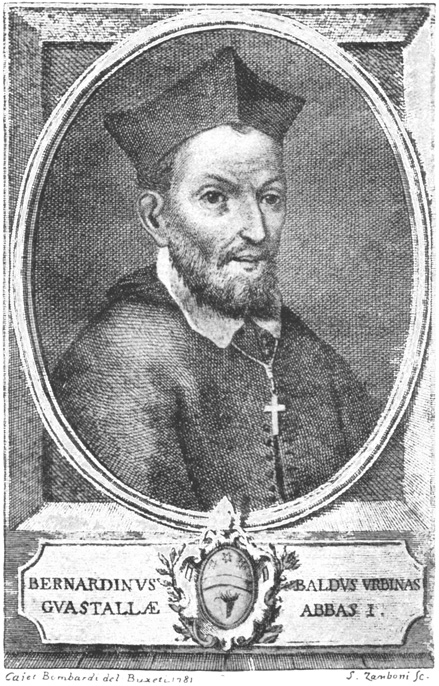 Bernardino Baldi (1553-1617), umanista italiano